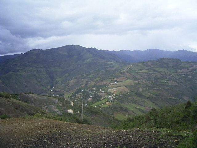 Paisaje alrededor de Quisango, María, Luya, Amazonas, Peru